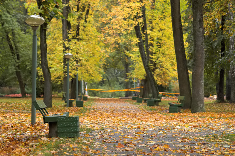 Druskininkai, pušyno parkas